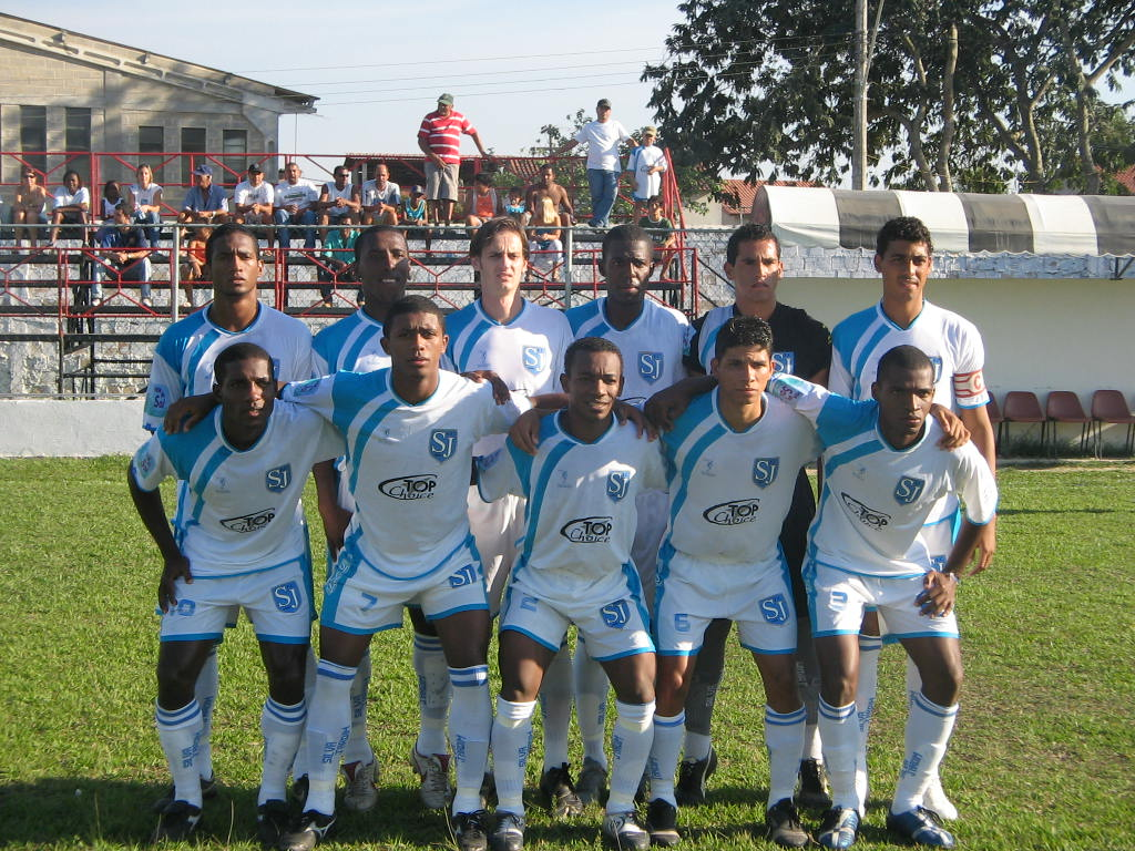 Equipe profissional do Silva Jardim, em 2007. Foto de Paulo Roberto Rodrigues.